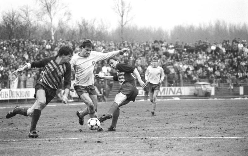 ADN-ZB/Kluge/22.3.86 Leipzig: Fußball Oberliga 1. FC Lok Leipzig - BFC Dynamo 1:1 / Der Leipziger Mittelstürmer Hans Richter (Mitte) wird hier im Berliner Strafraum von Frank Rohde (l.) und Heiko Brestricht (beide BFC) attackiert.